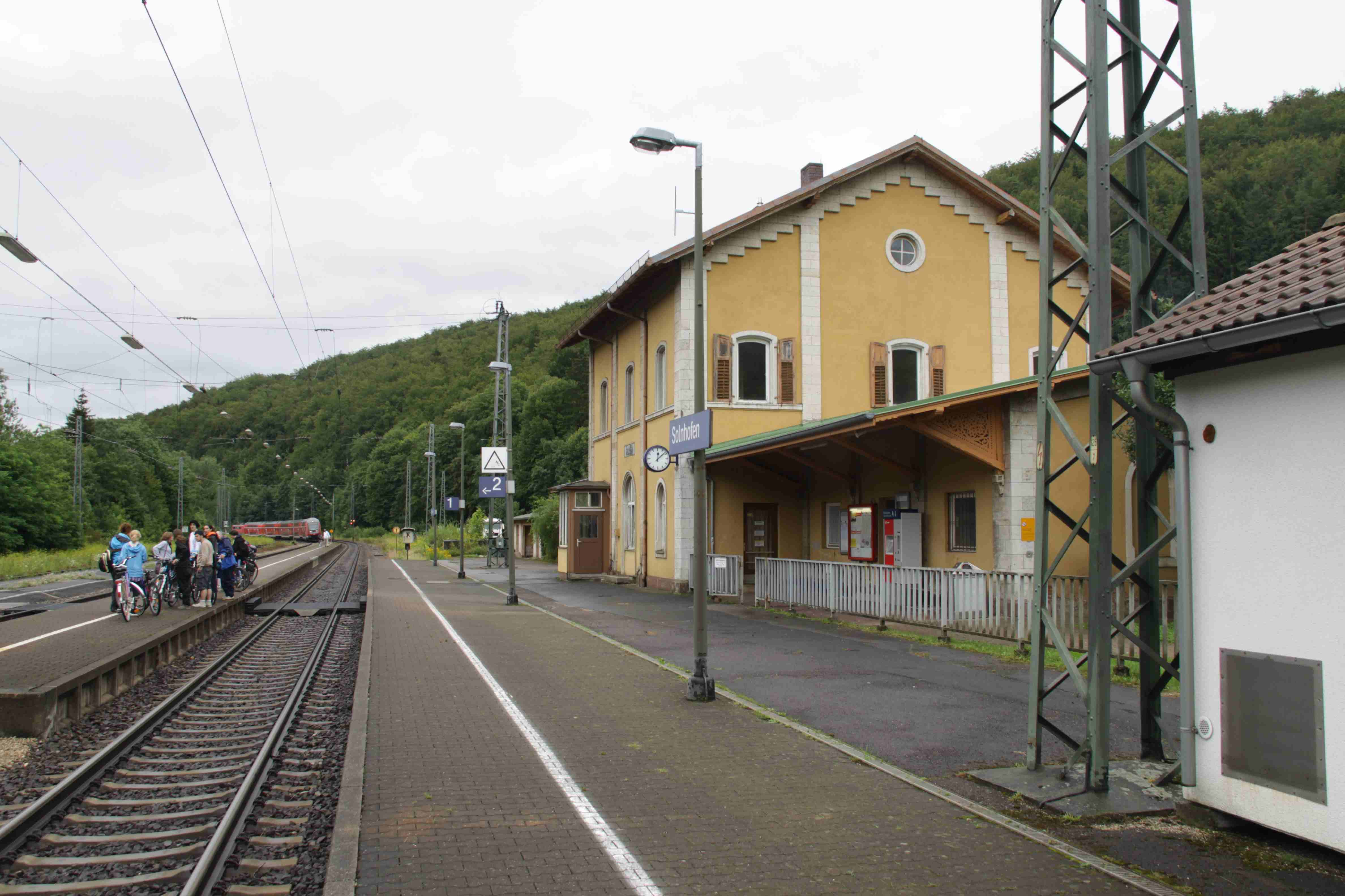 Bahnhof Solnhofen